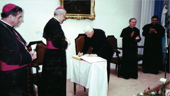 Kardinál Joseph Ratzinger vtedajší prefekt Kongregácie pre náuku viery na RKCMBF UK v Bratislave 1. apríla 1992.